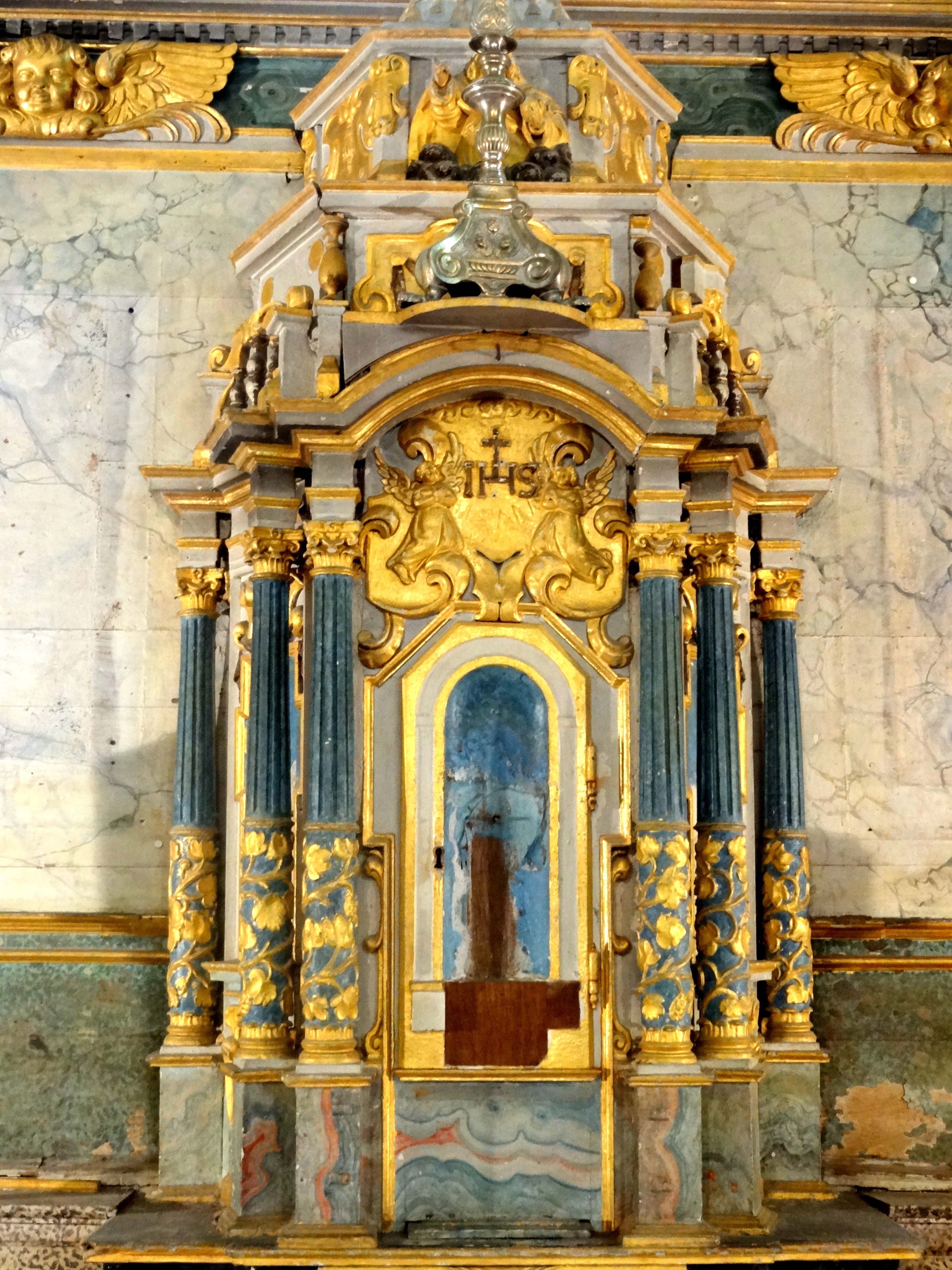 Mobilier de l'église - voir titre.